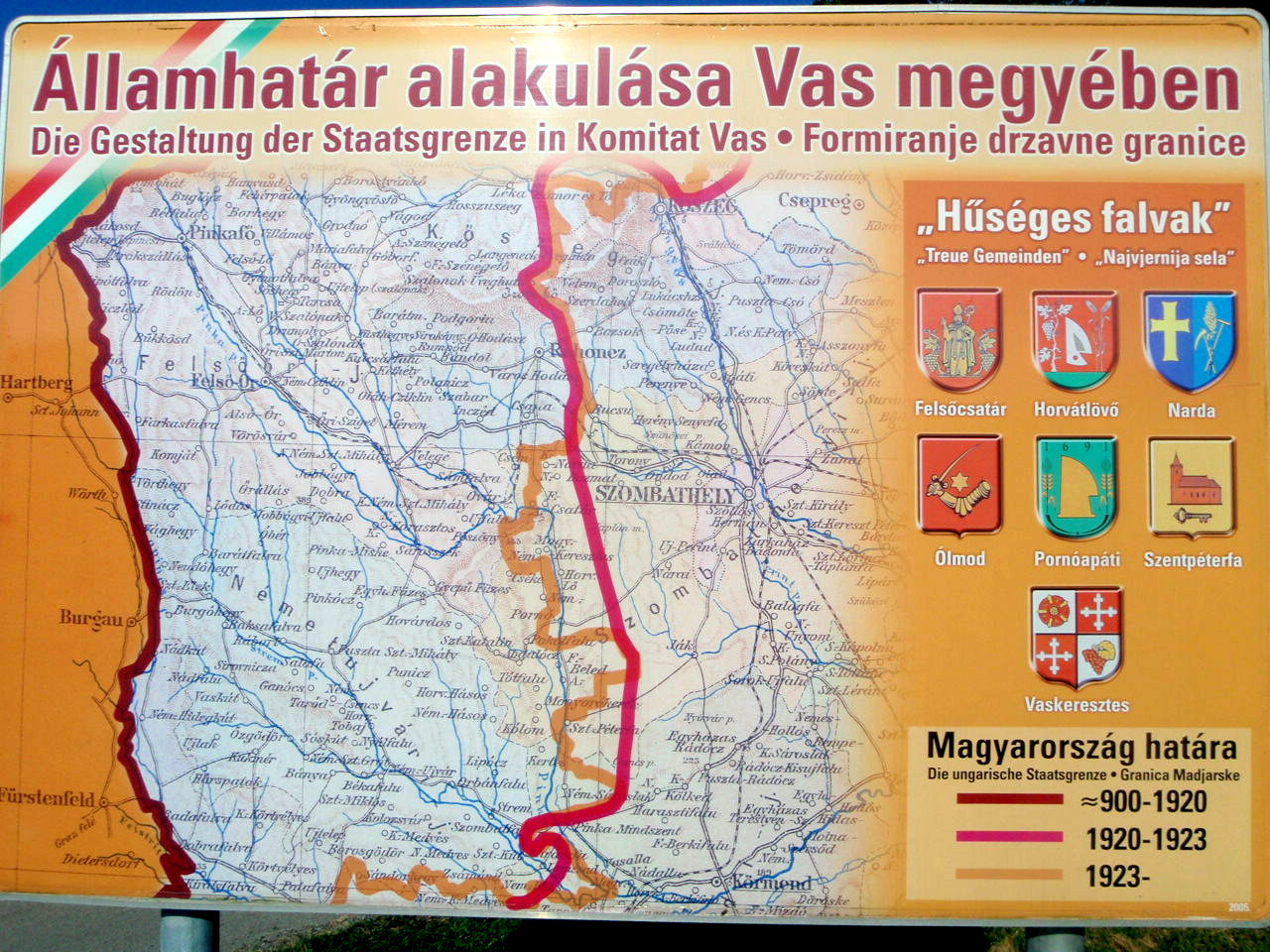 Pinkatal Grenzenwechsel l922.